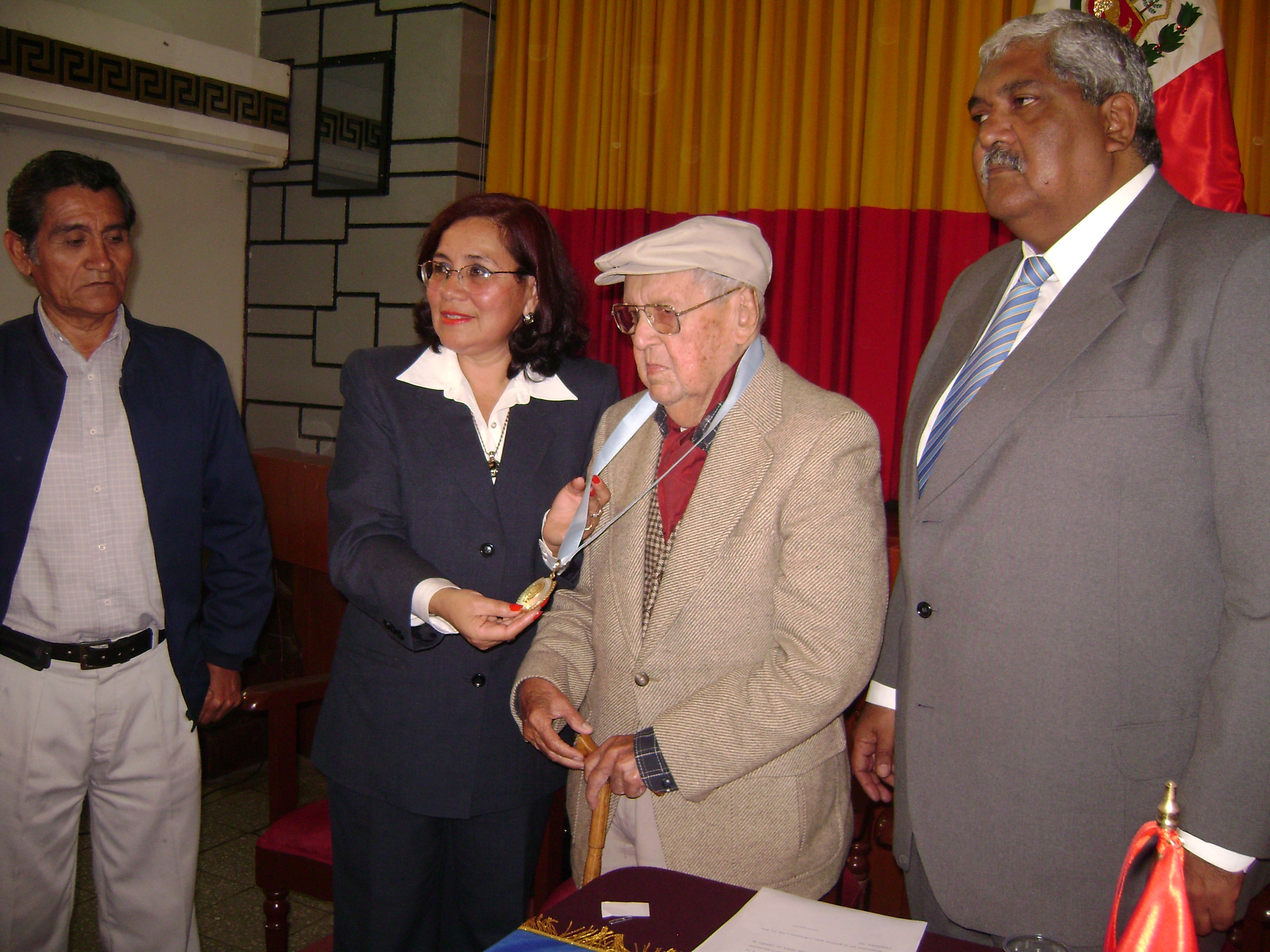 Nixa